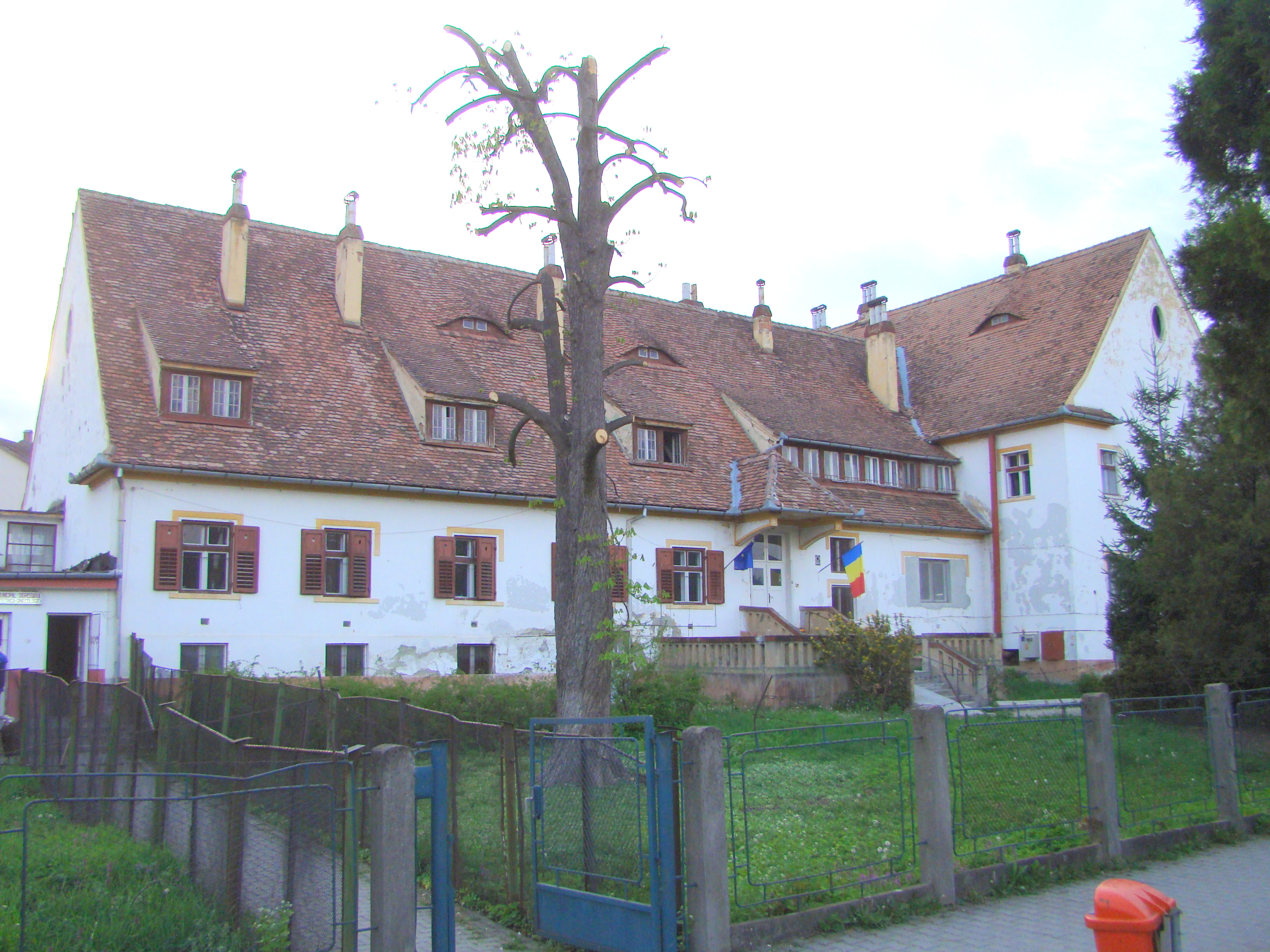 Fostul sanatoriu, azi maternitatea, municipiul Sighișoara, str. Gării 1 înc. sec. XX